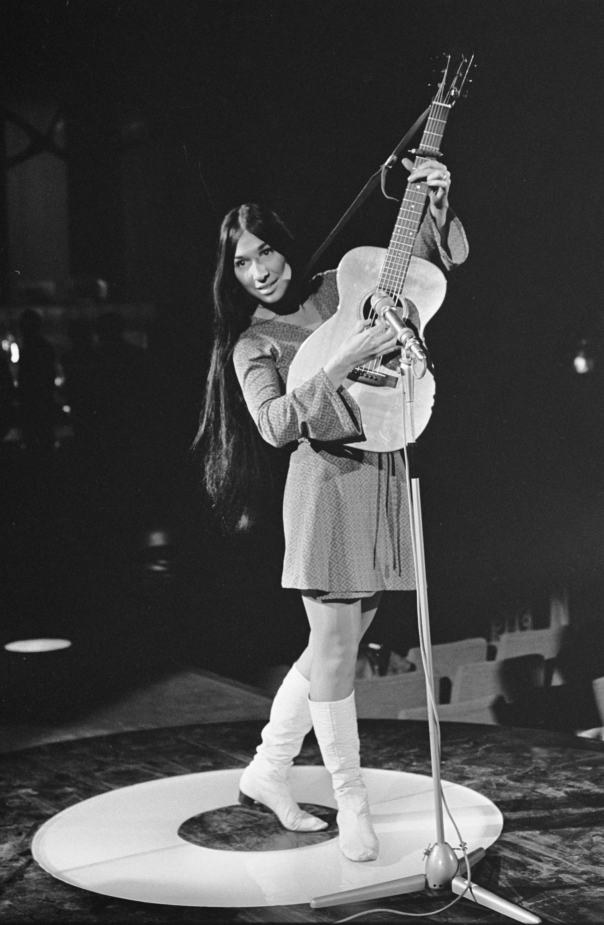 Collectie / Archief : Fotocollectie Anefo Reportage / Serie : Grand Gala du Disque 1968 Beschrijving : Grand Gala du Disque in RAI. Canadese zangeres Buffy Sainte-Marie Datum : 6 maart 1968 Locatie : Amsterdam Trefwoorden : zangers Persoonsnaam : Sainte-Marie, Buffy Instellingsnaam : RAI Fotograaf : Nijs, Jac. de / Anefo Auteursrechthebbende : Nationaal Archief Materiaalsoort : Negatief (zwart/wit) Nummer archiefinventaris : bekijk toegang 2.24.01.05 Bestanddeelnummer : 921-1411